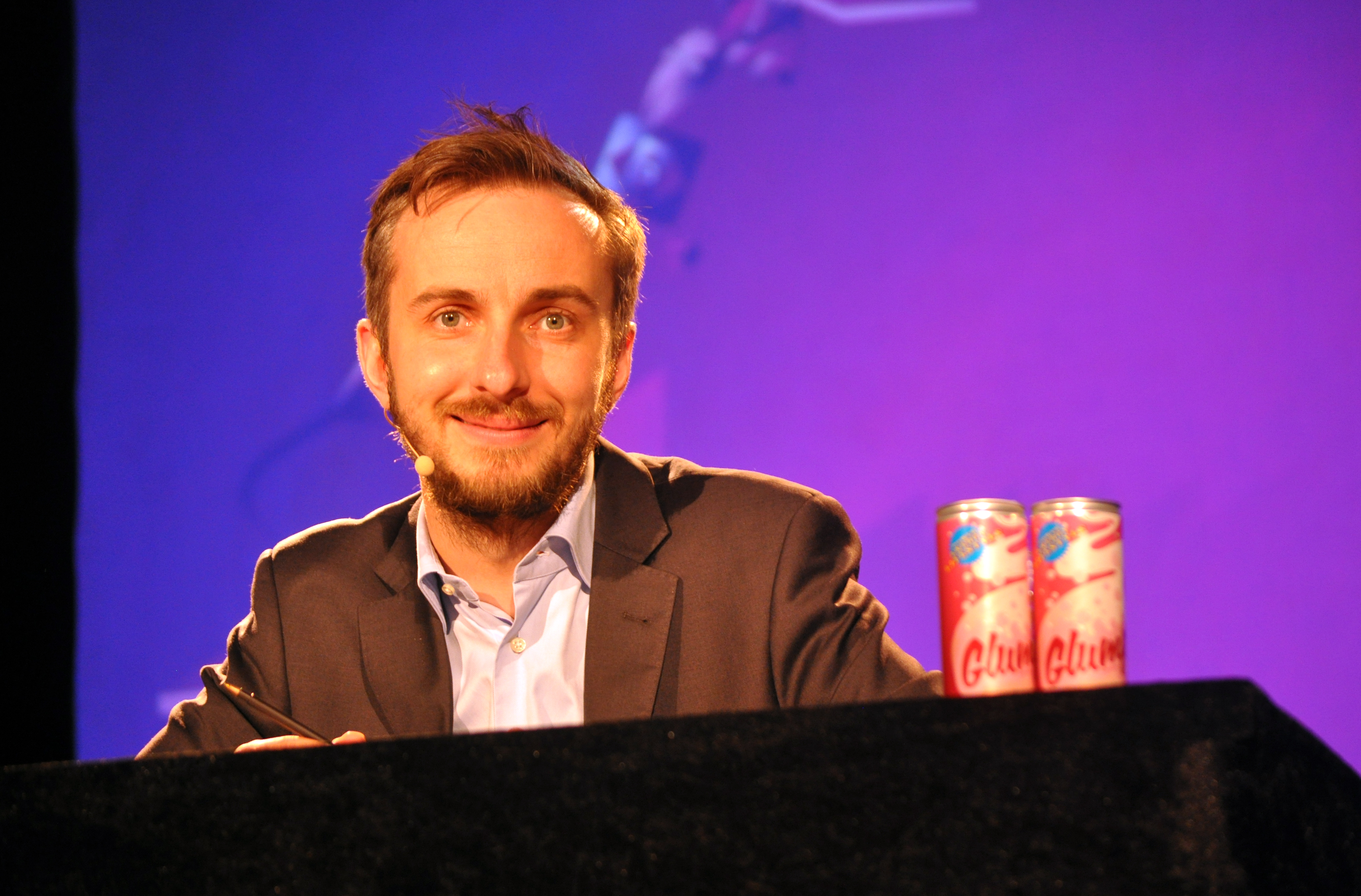 Jan Böhmermann mit seinem Programm "Schlimmer als Jan Böhmermann" in Rostock 2014